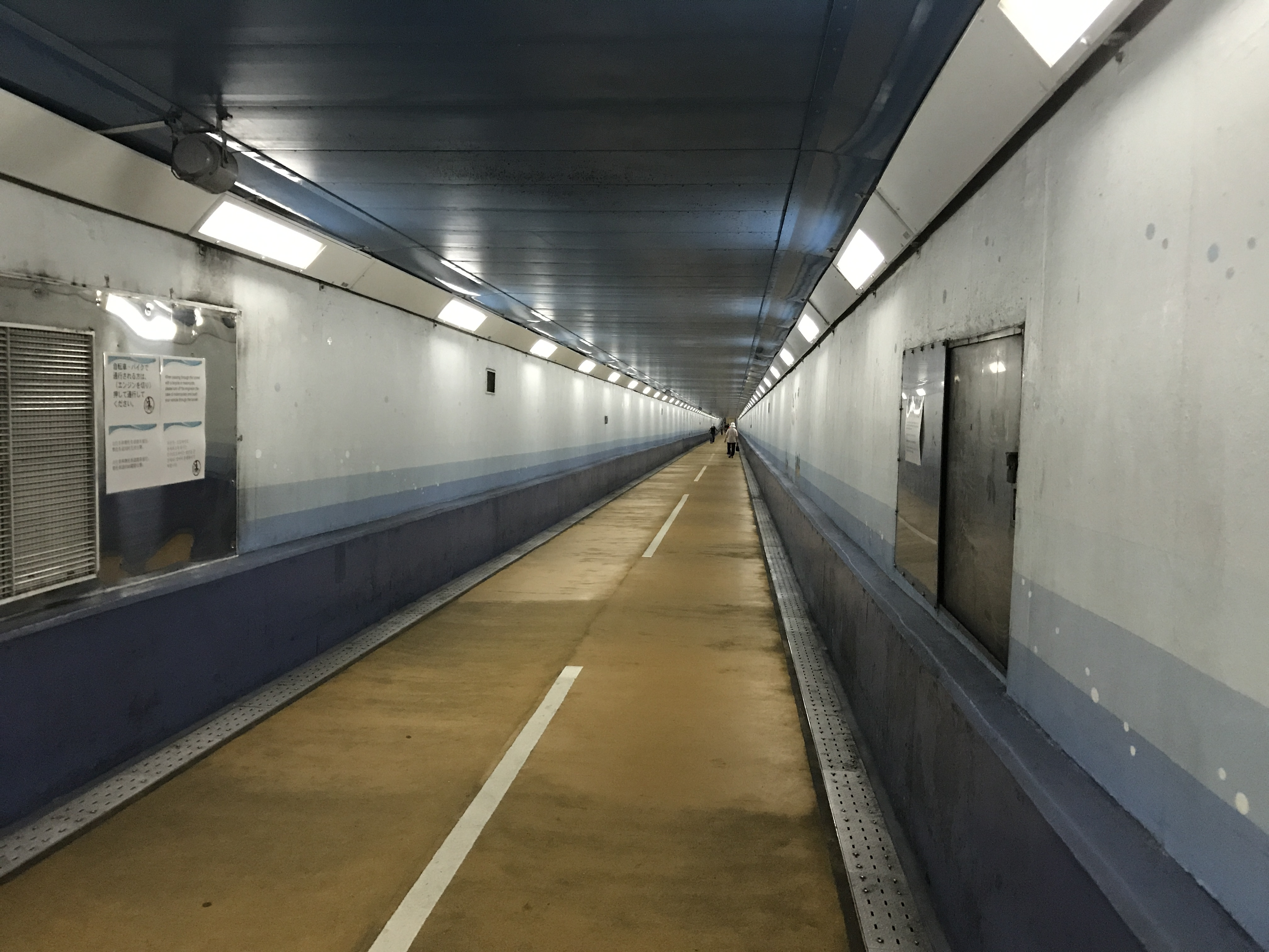 関門トンネル人道